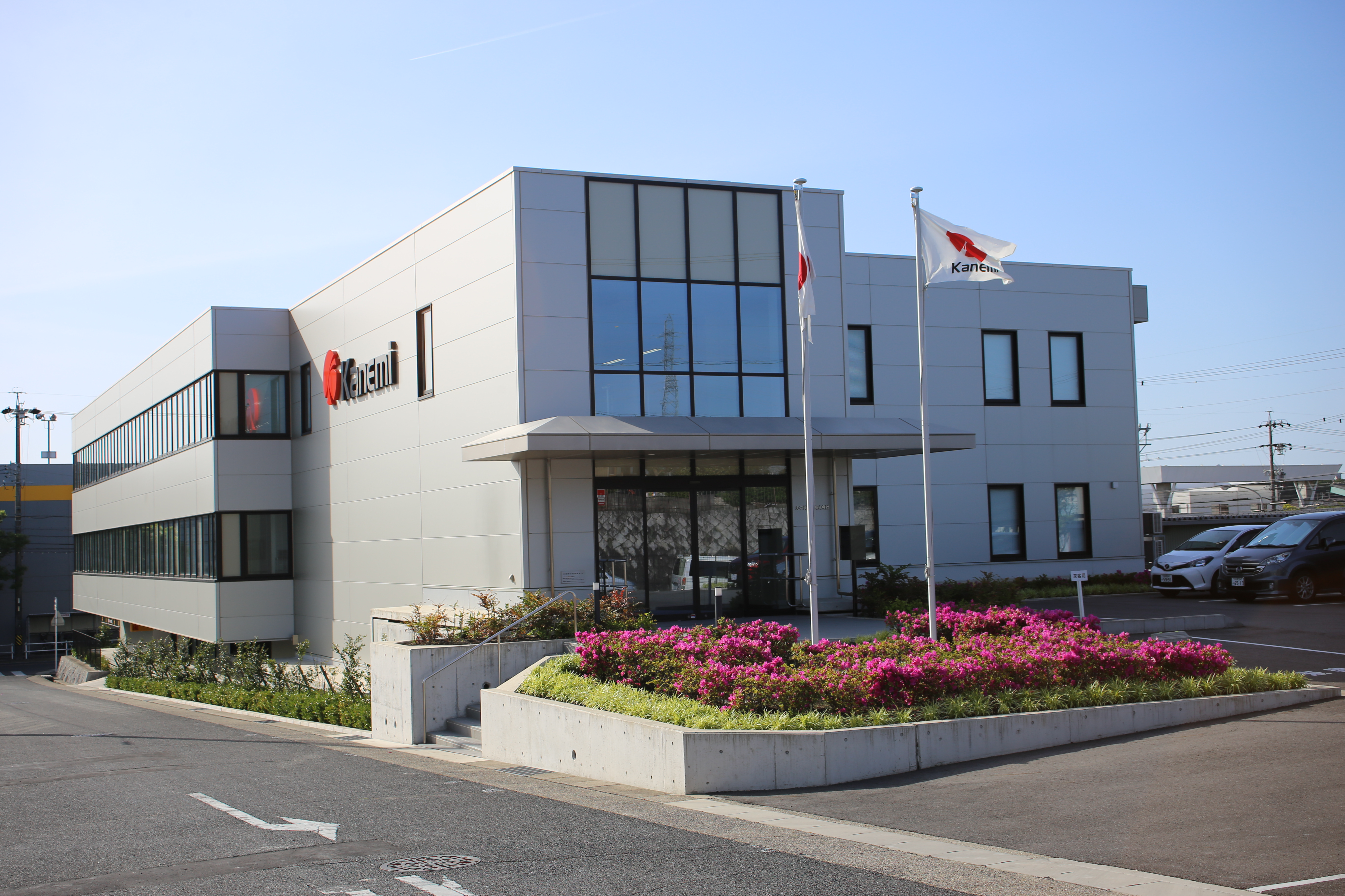 名古屋市緑区徳重三丁目のカネ美食品本社を南側公道東側より撮影